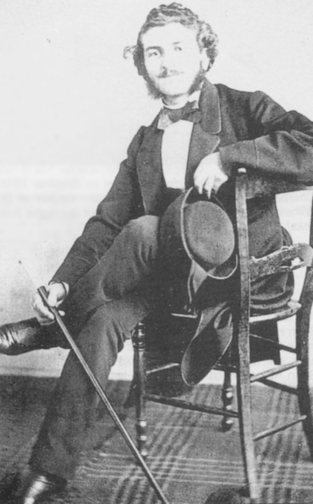 Hermann Behaghel, einige Jahre vor 1874, reprod. in Inge und Rudolf Rothenhöfer: Hermann Behaghel (1839–1921), Erbauer der evangelischen Kirche in Bad Rappenau und Ehrenbürger der Stadt. In: Bad Rappenauer Heimatbote 13, 2002, S. 105.